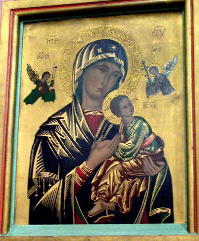 Ikone Gottesmuter. Urbanus Kirche. Dorsten-Rhade.